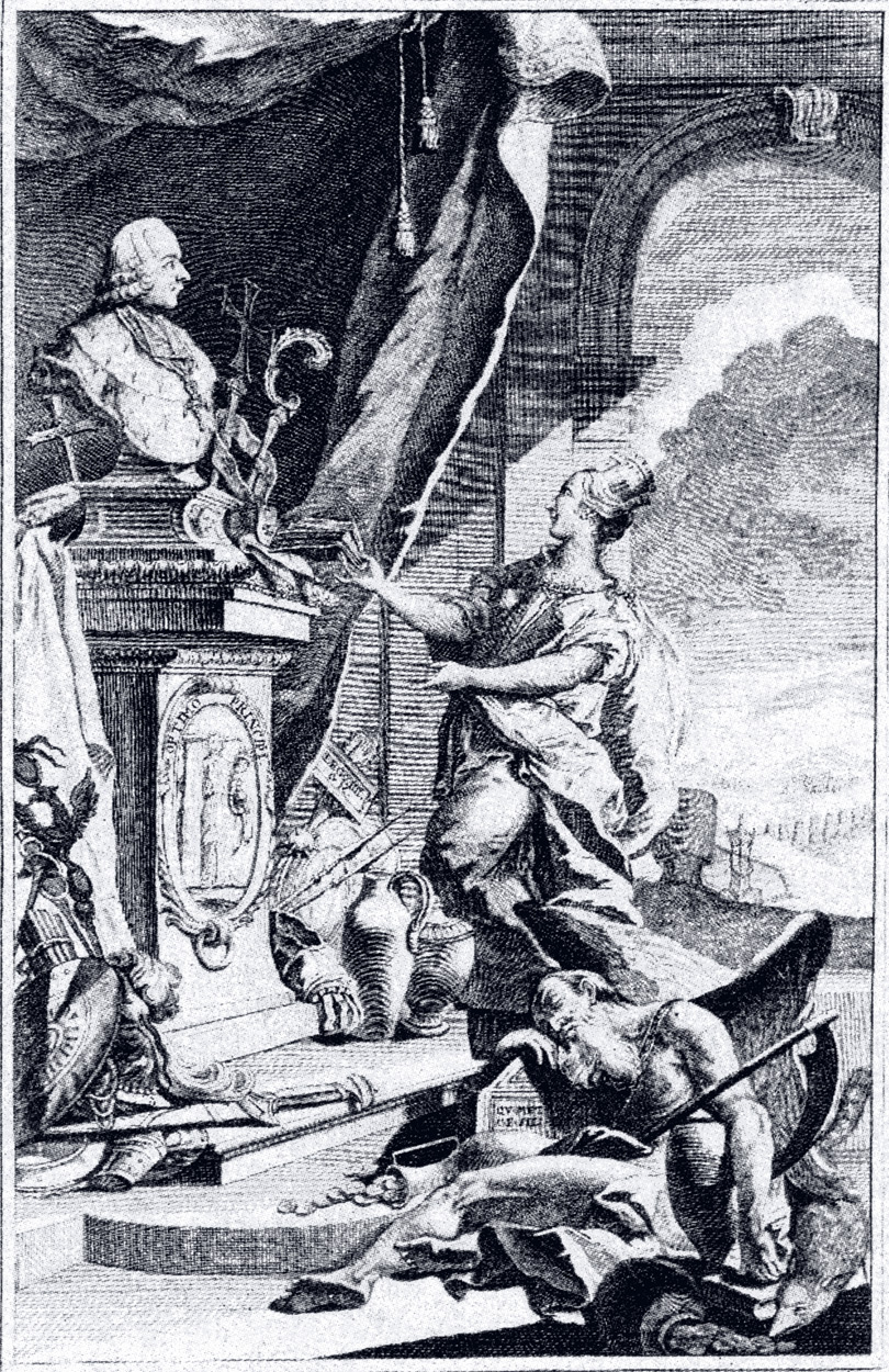 Frontispiz des ersten Bandes von Pater Joseph Fuchs' „Alter Geschichte von Mainz“ (erschienen 1771). Die Stadtgöttin Moguntia, umgeben von symbolischen und reellen Zeugnissen aus der römischen Vergangenheit von Mainz steht vor der Büste von Kurfürst Emmerich Joseph von Breidbach zu Bürresheim.